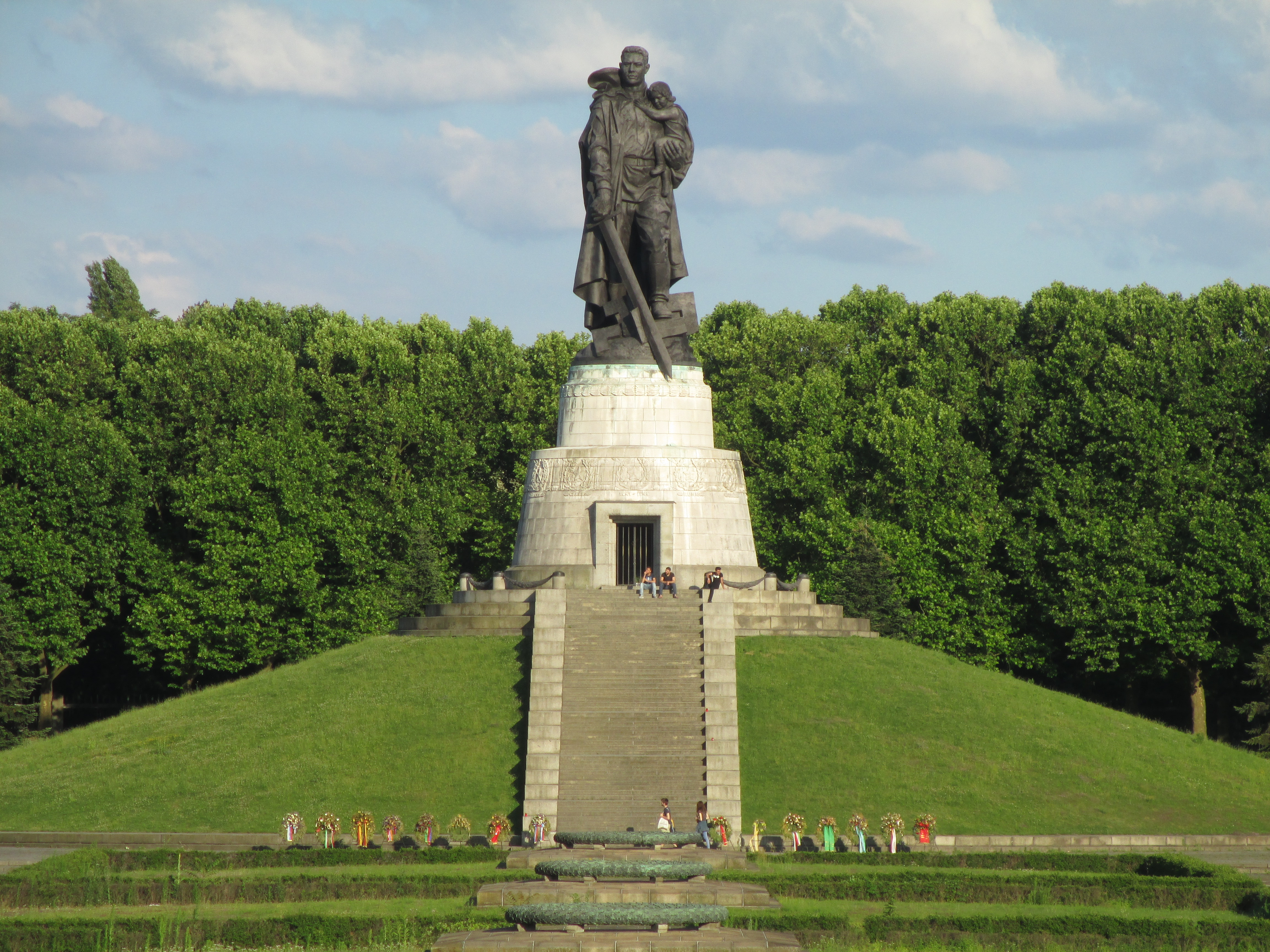 אנדרטת המלחמה הסובייטית בפארק טרפטו בברלין